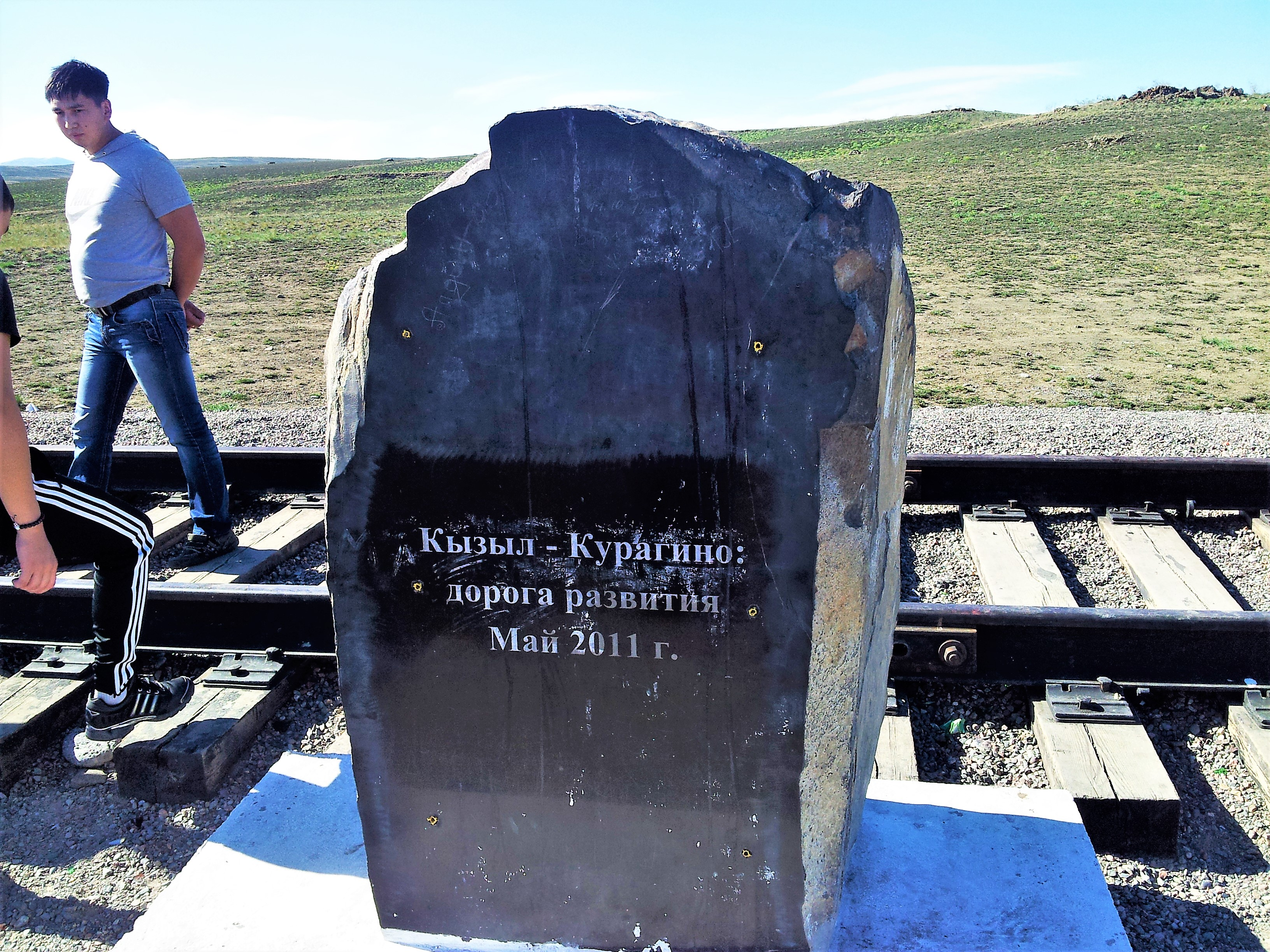 Тыва дыл: х.Кызыл. Кызыл-Курагино демир-оруунуң тураскаалы